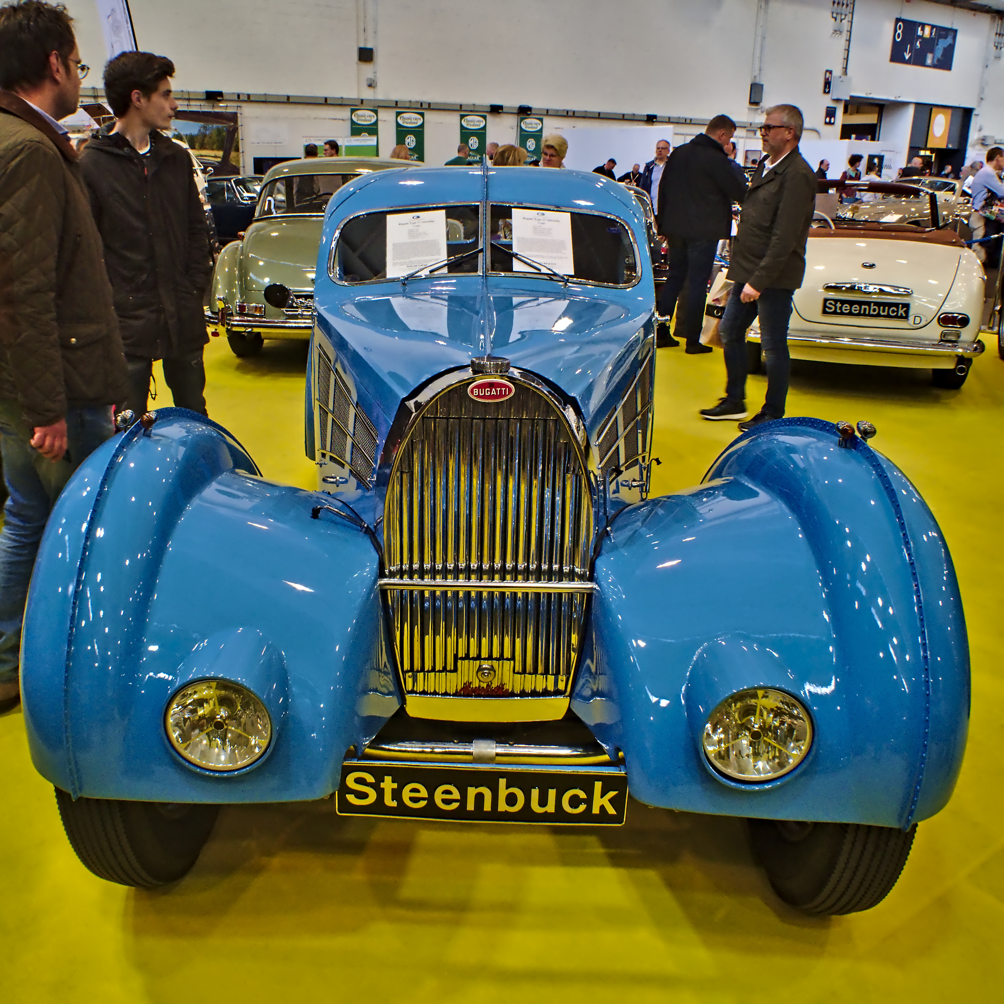 Techno Classica 2019